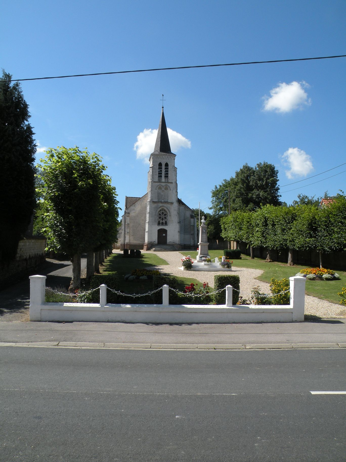 L'église de Lespinoy.